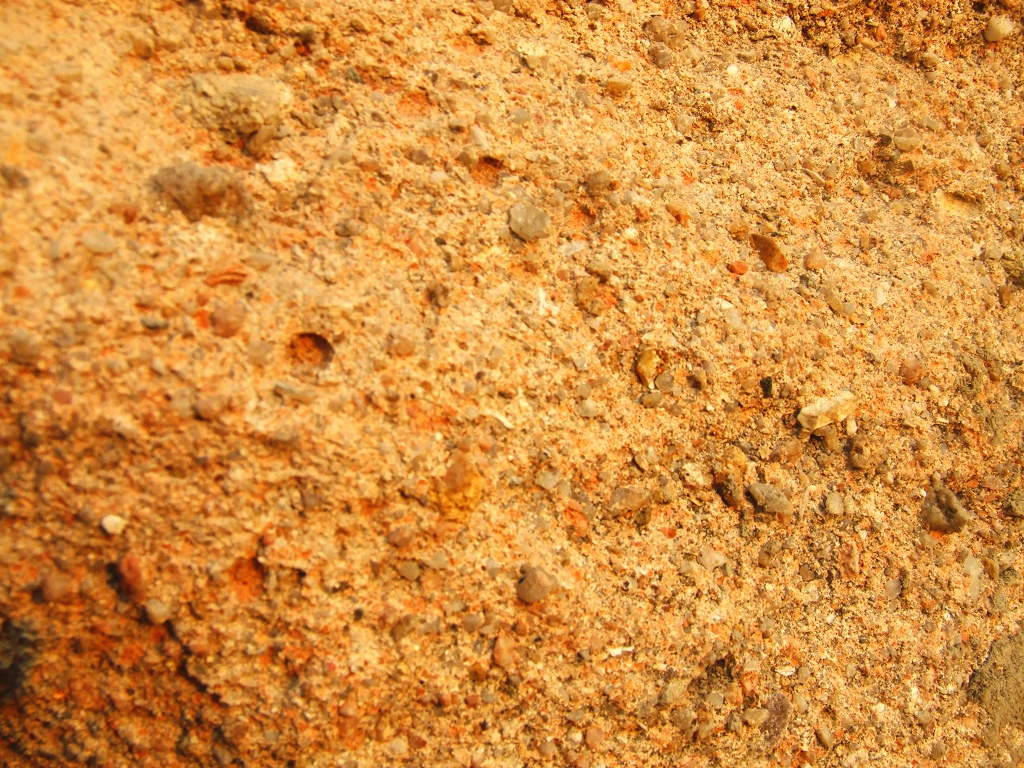 丰顺新楼村种玊上围古寨20141005